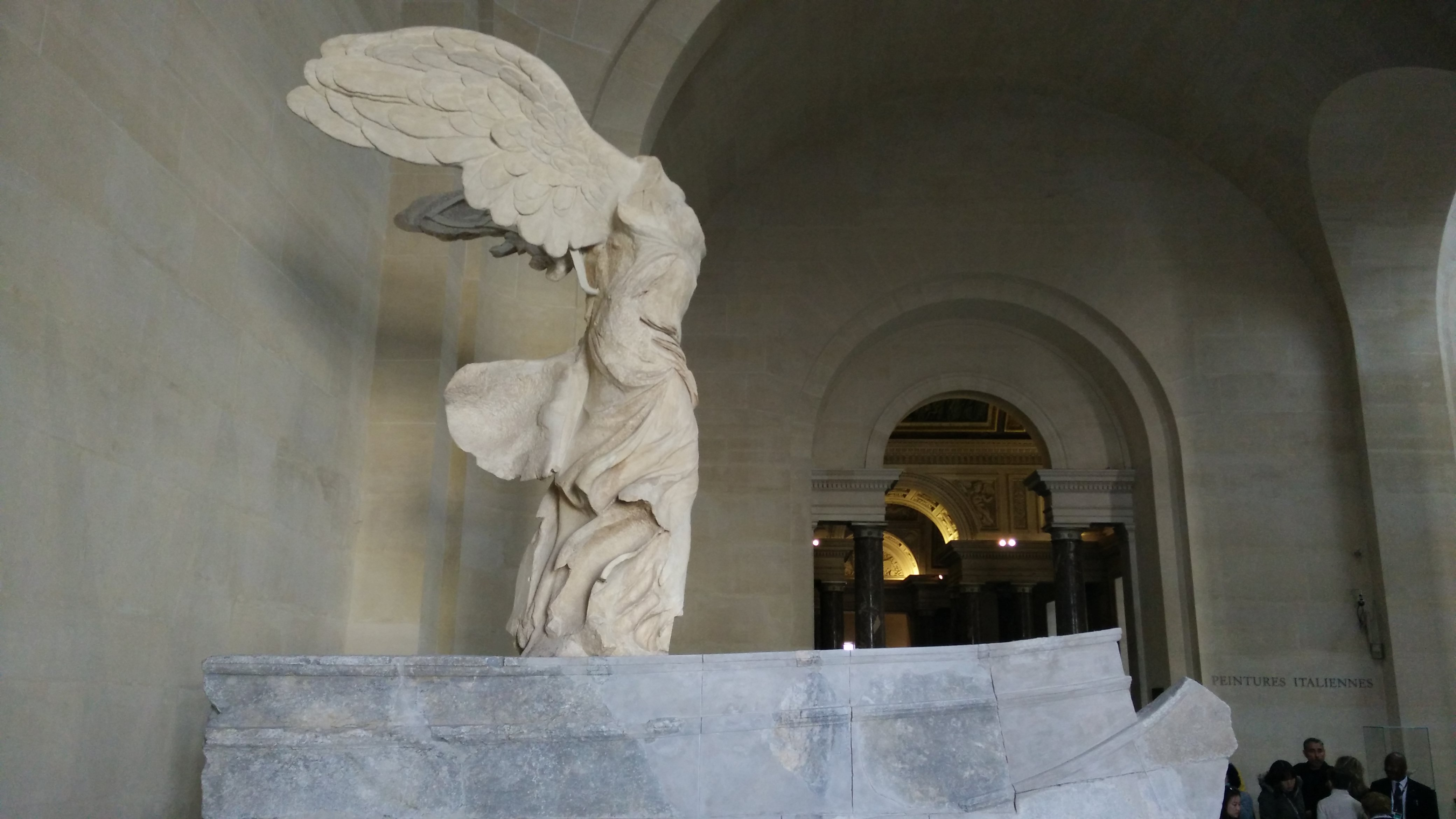 IMG_20141107_125035